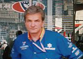 Grand Prix de Monaco 1996